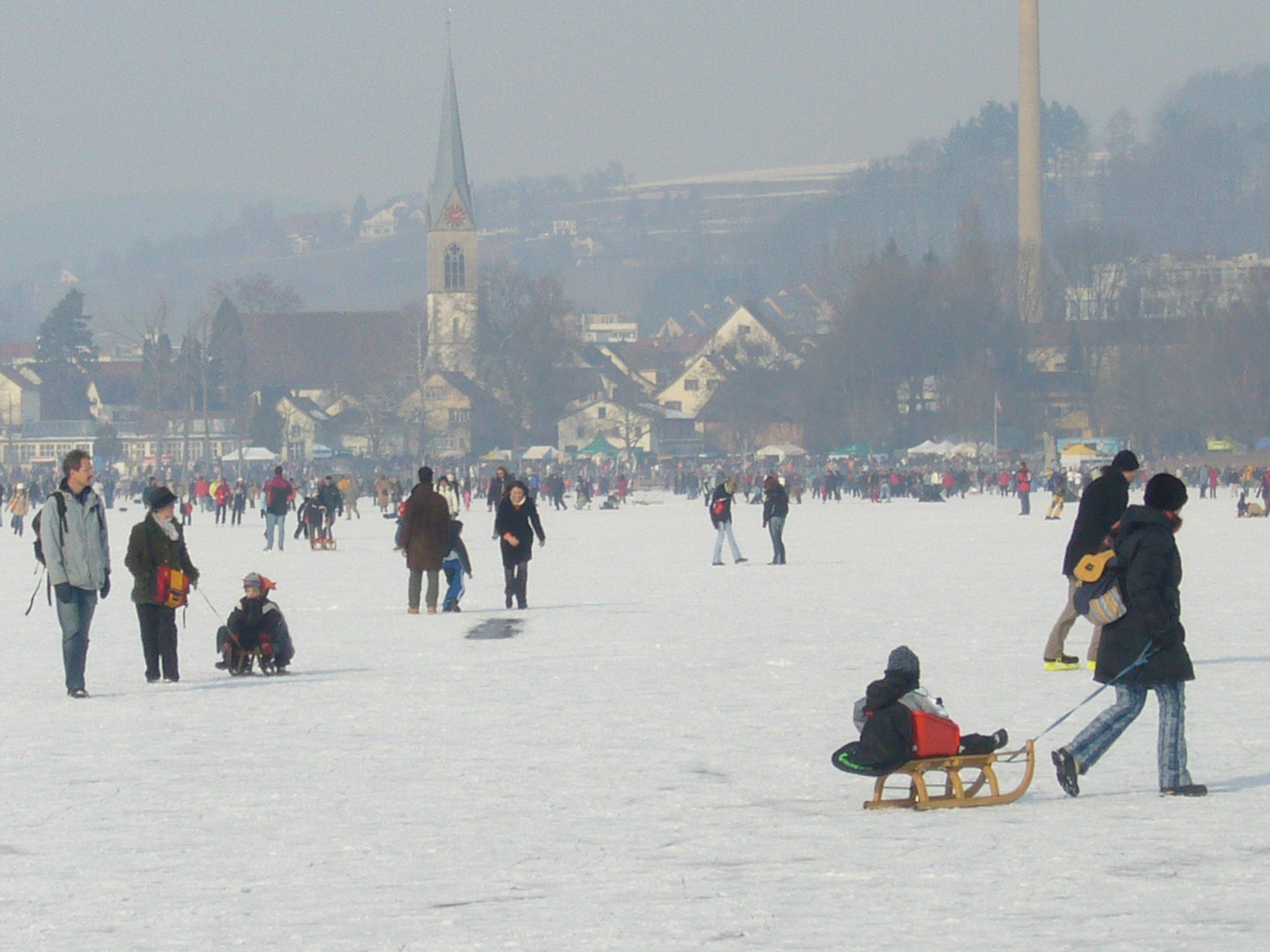 Pfäffikon, Seegfrörni im Januar, im Hintergrund die Kirche von Pfäffikon, Kanton Zürich, Schweiz.